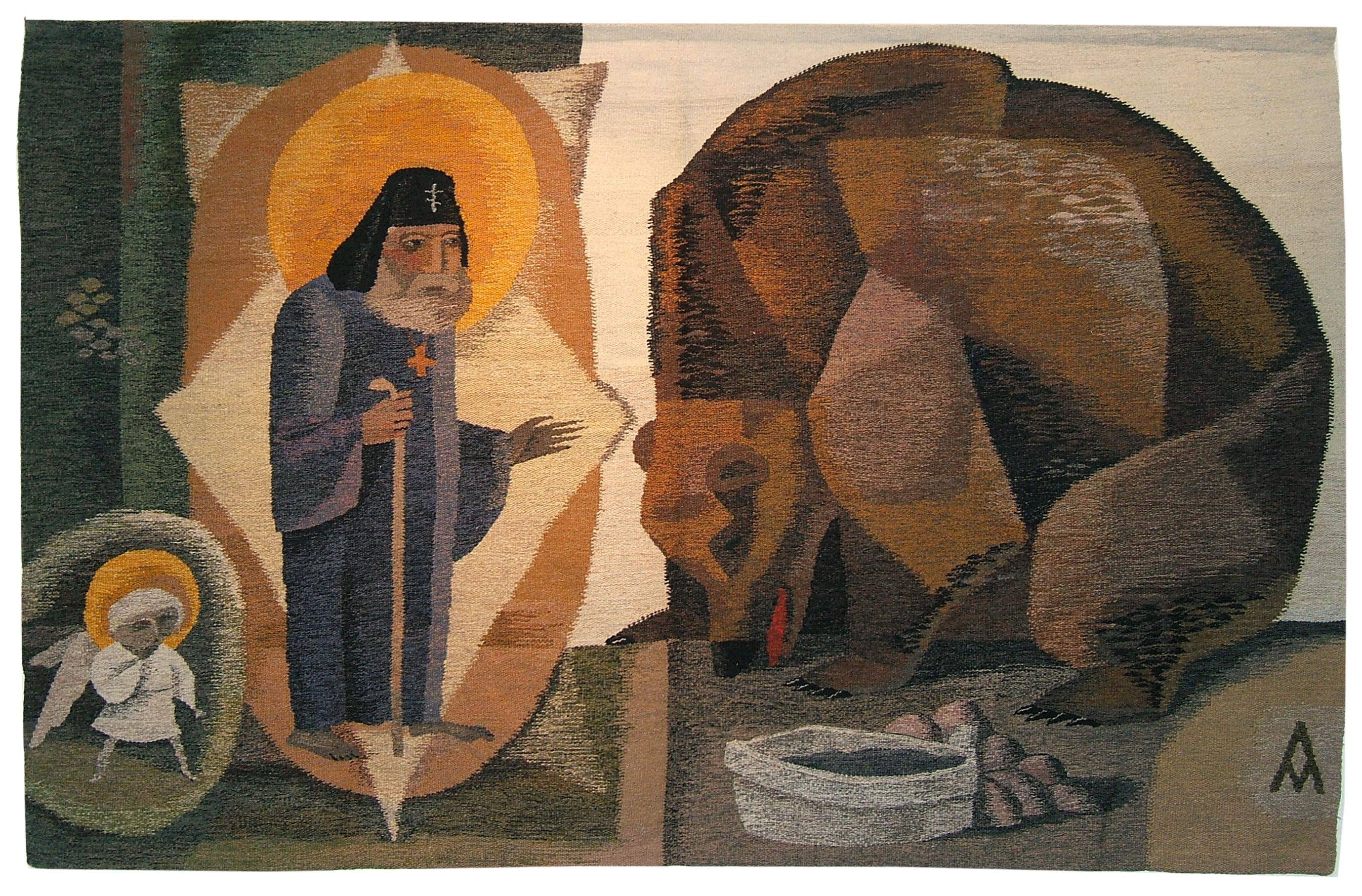 Андрей Мадекин. Гобелен "Серафим Саровский и медведь" 130 х 200 см, 1995 Собственный архив.